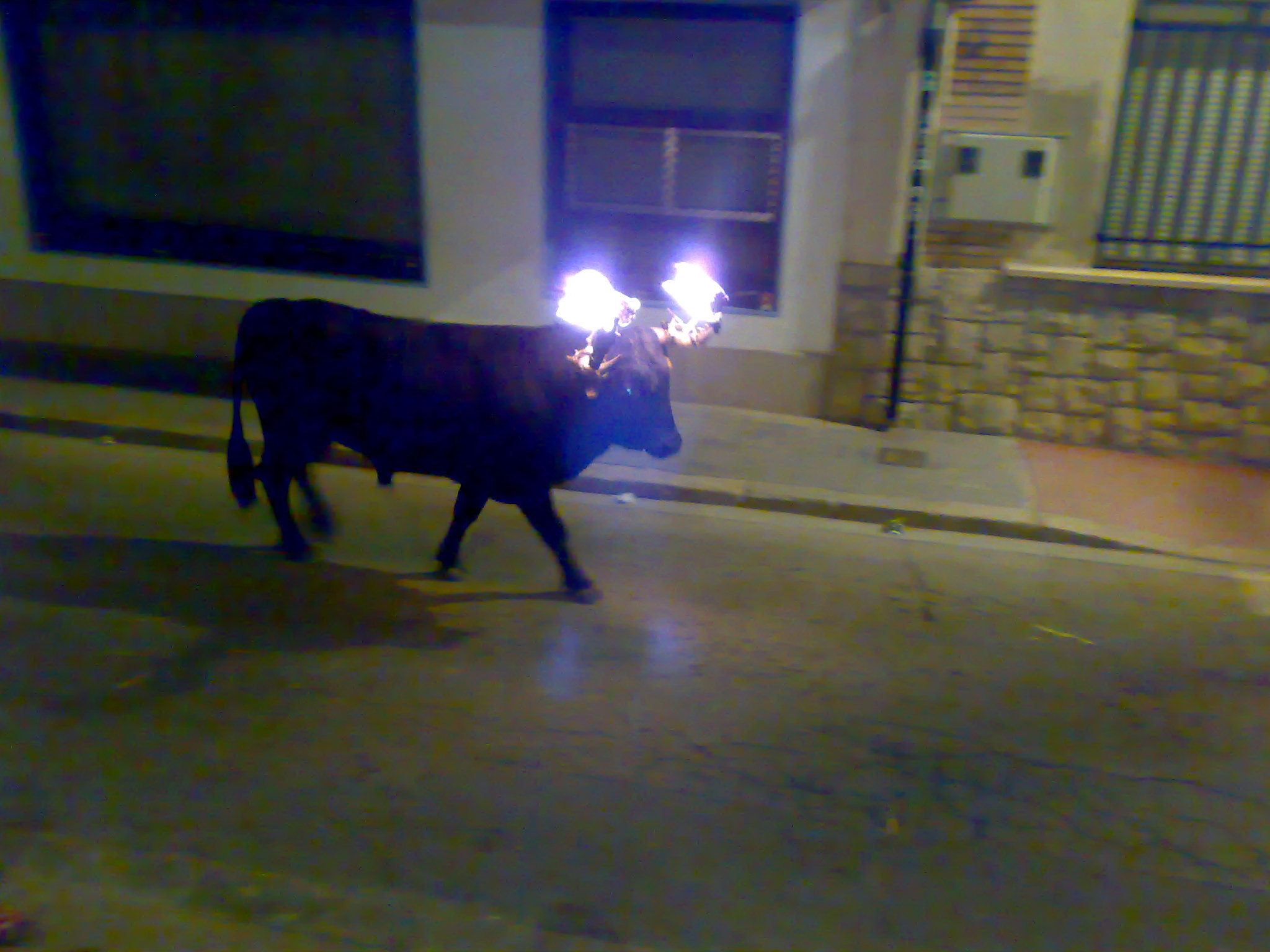 Bou embolat a Godella (ramaderia La Cometa). És el bou d'aquesta notícia.